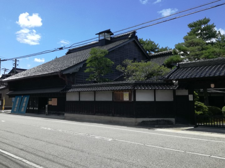 金岡邸外観（投稿者撮影）